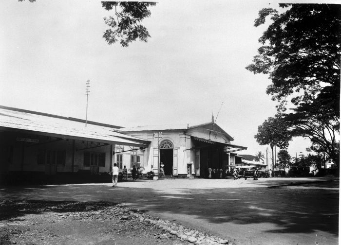 Foto. Plein voor het stationsgebouw te Malang.